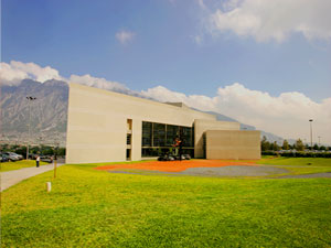 Periodismo 26